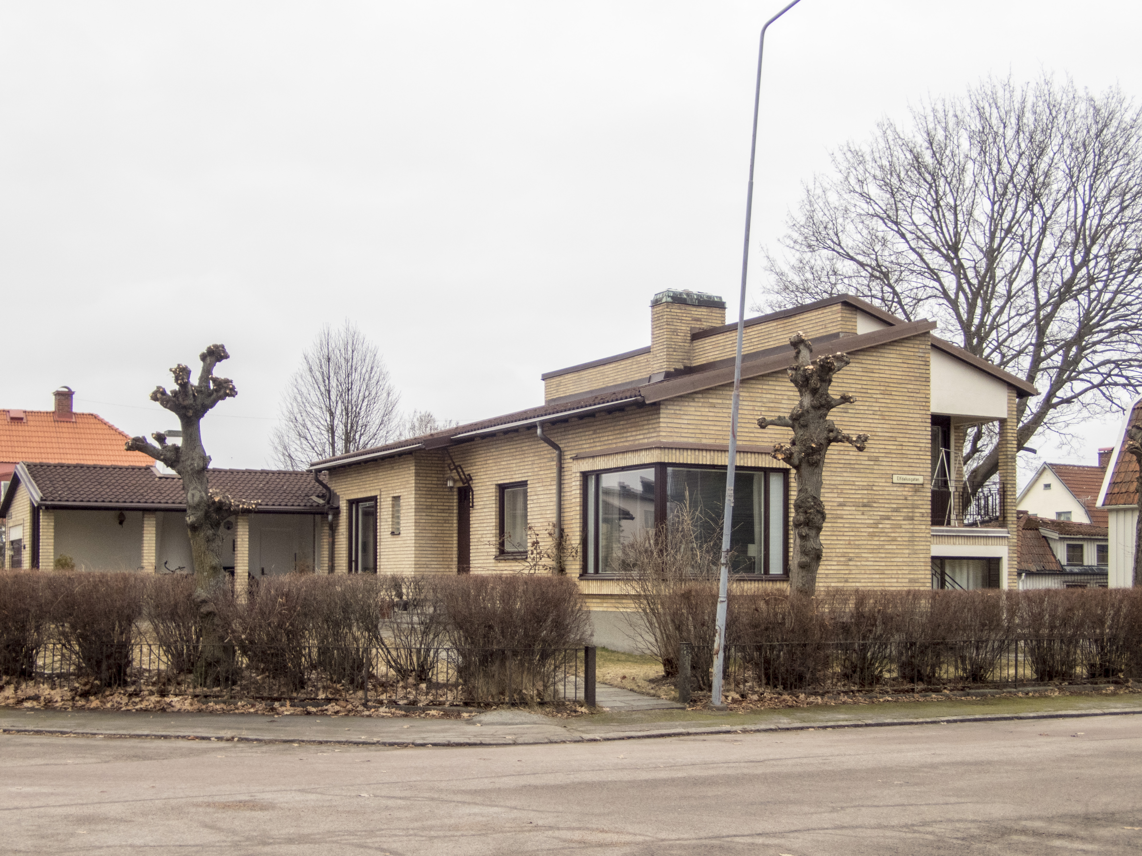 Svanen 1, Gylleniusgatan 2 Karlstad. Byggår 1957, Arkitekt Erik Örnebring